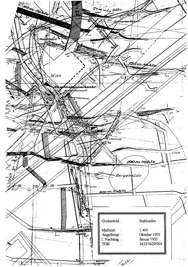 Grubenplan der Grube Stahlseifen bei Salchendorf (Neunkirchen) im Siegerland aus dem Jahr 1905.